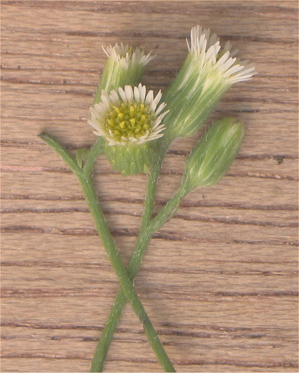 (nl: Canadese fijnstraal bloempjes) Conyza canadensis